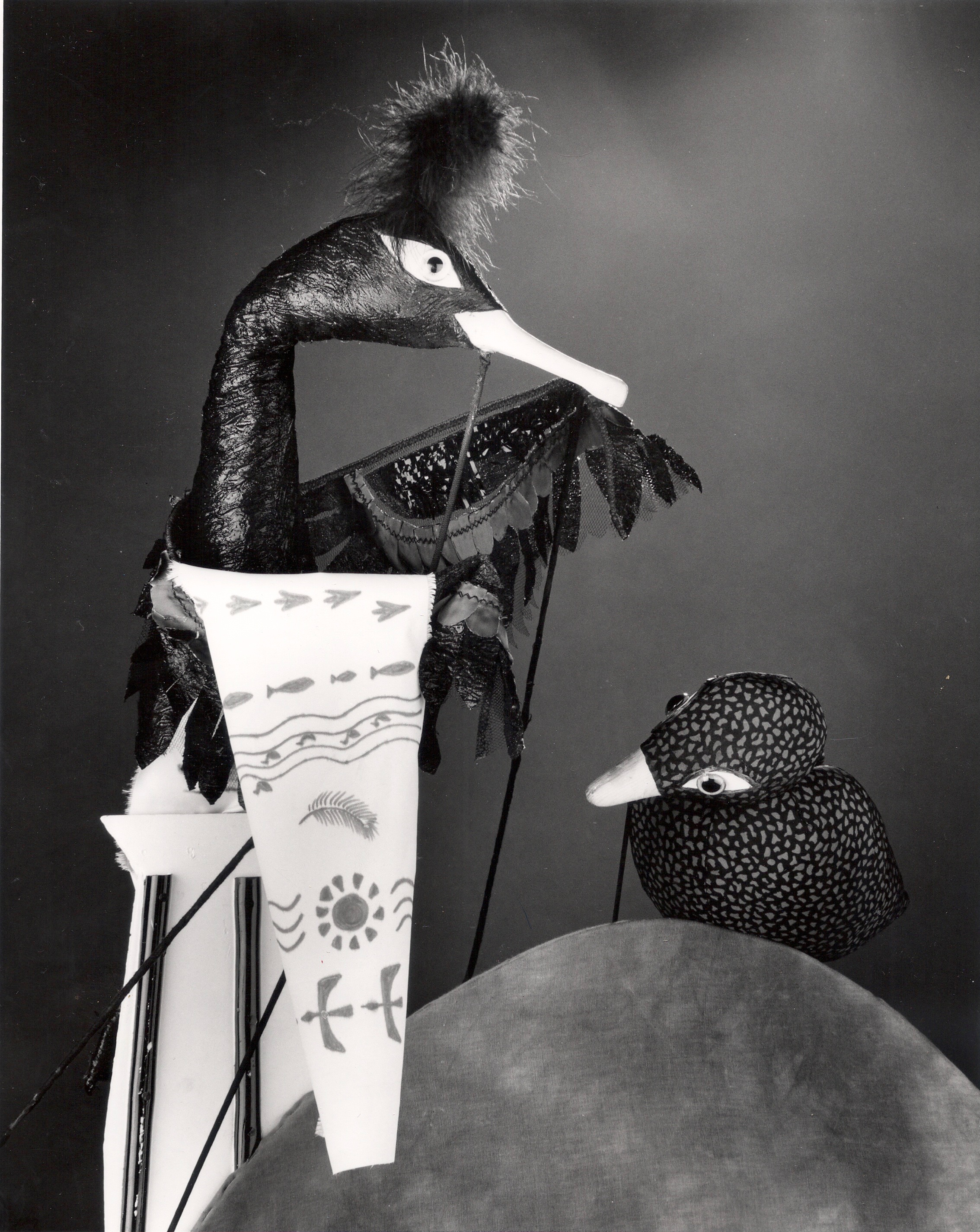 Tromsø dukketeater profesjonelle del 1990 "Skarven og Ea"Dukke-og skyggespillteater. Dukkemakere Brit Steinsvik og Randi Nilssen. Foto: Ola Røe